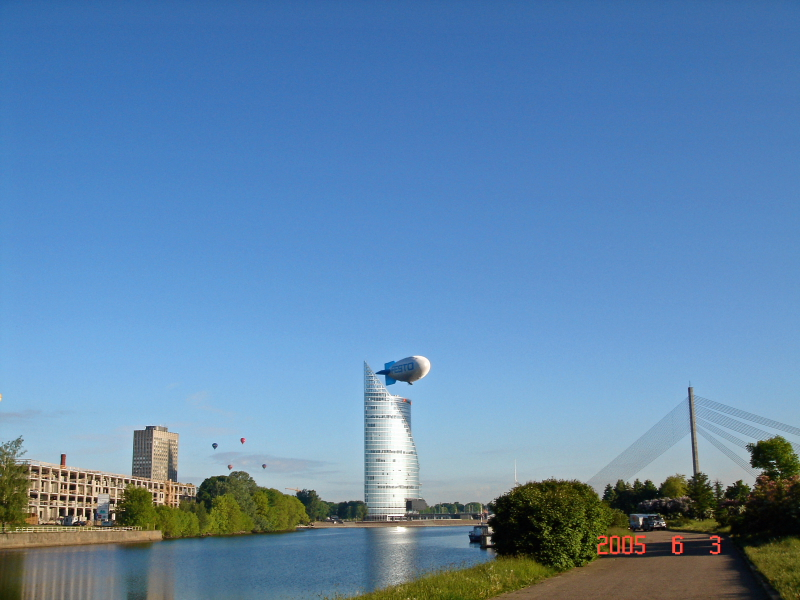 My air-transport